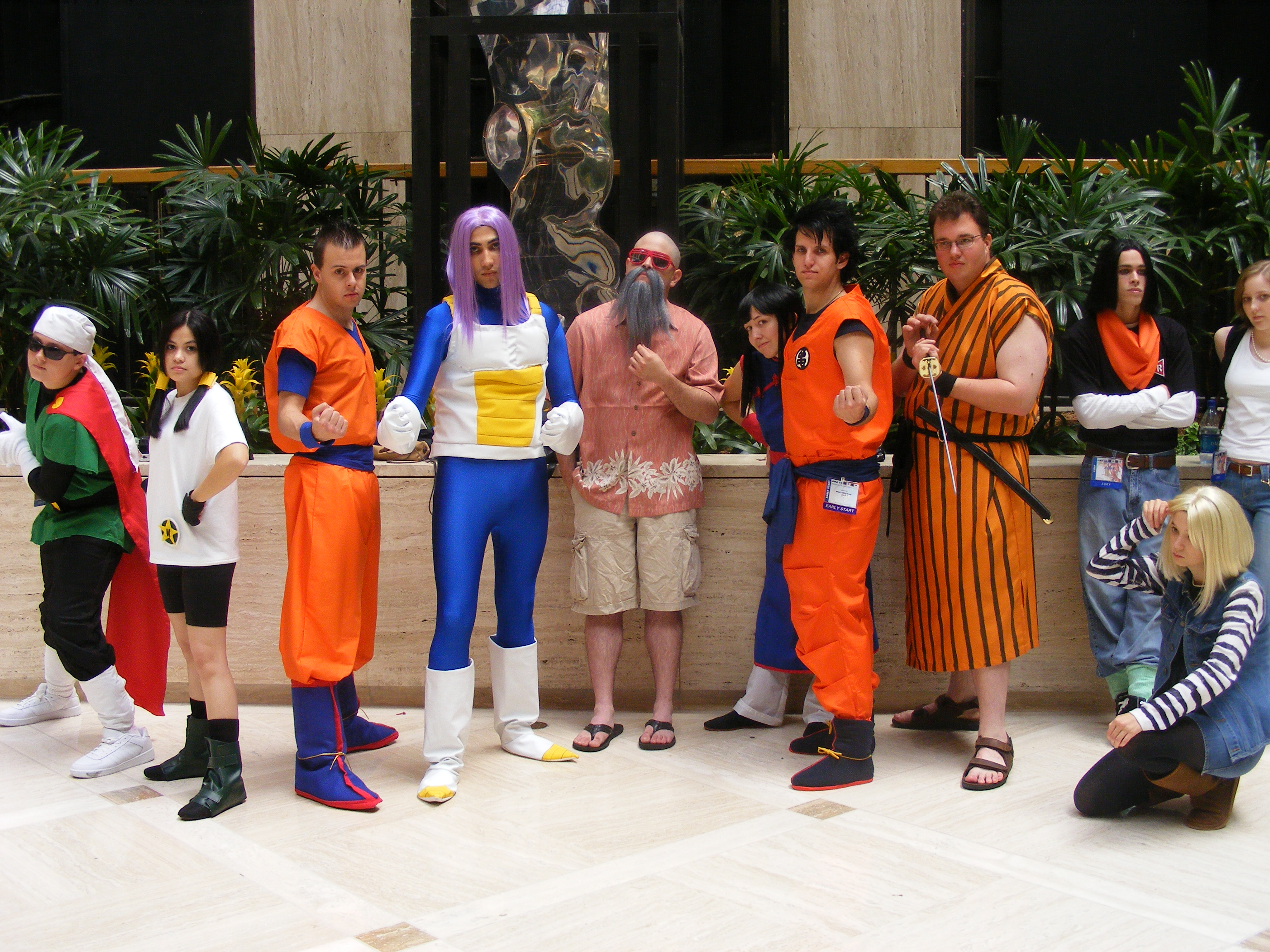 AWA14: cosplay de personajes de Dragon Ball Z.